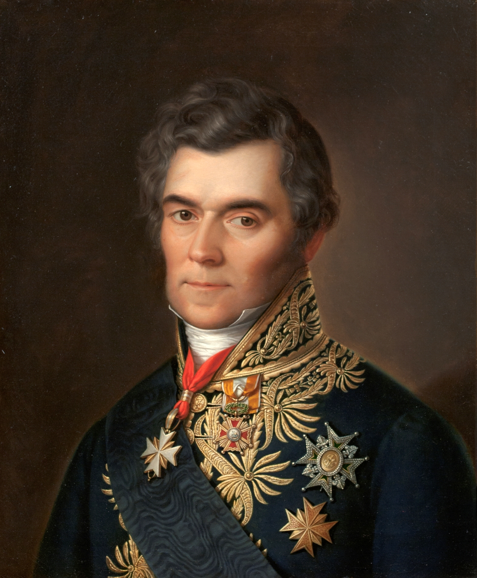 El pintor Luis de la Cruz y Ríos (1776-1853) aparece vistiendo el uniforme de secretario de Cámara y luciendo la cruz, placa y banda de la Orden de la Espuela de Oro, que le fue otorgada por el papa Pio VII, además de la placa de comendador de la Orden de Carlos III y la encomienda ordinaria de la Orden de Isabel la Católica. En esta obra queda patente el deseo del pintor de ver reconocidos sus méritos en la Corte del rey Fernando VII. Así, lejos de aparecer con su indumentaria de trabajo o con ropas civiles, el artista canario quiso pasar a la posteridad en esta imagen madura como un destacado funcionario palatino, con apariencia casi de distinguido diplomático, revestido de un rico uniforme de llamativos bordados y cuajado de las condecoraciones que acumuló a lo largo de su carrera, si bien la mayoría de ellas le fueron concedidas por razones protocolarias, y el cargo de Secretario Real tan sólo lo tuvo con carácter honorífico, sin que llegara tampoco a ejercerlo nunca. No obstante, además de las condecoraciones que luce en el presente lienzo, recibió a lo largo de su carrera los nombramientos de conde del Sacro Palacio Pontificio y caballero de Orden de San Miguel en el reino de Francia